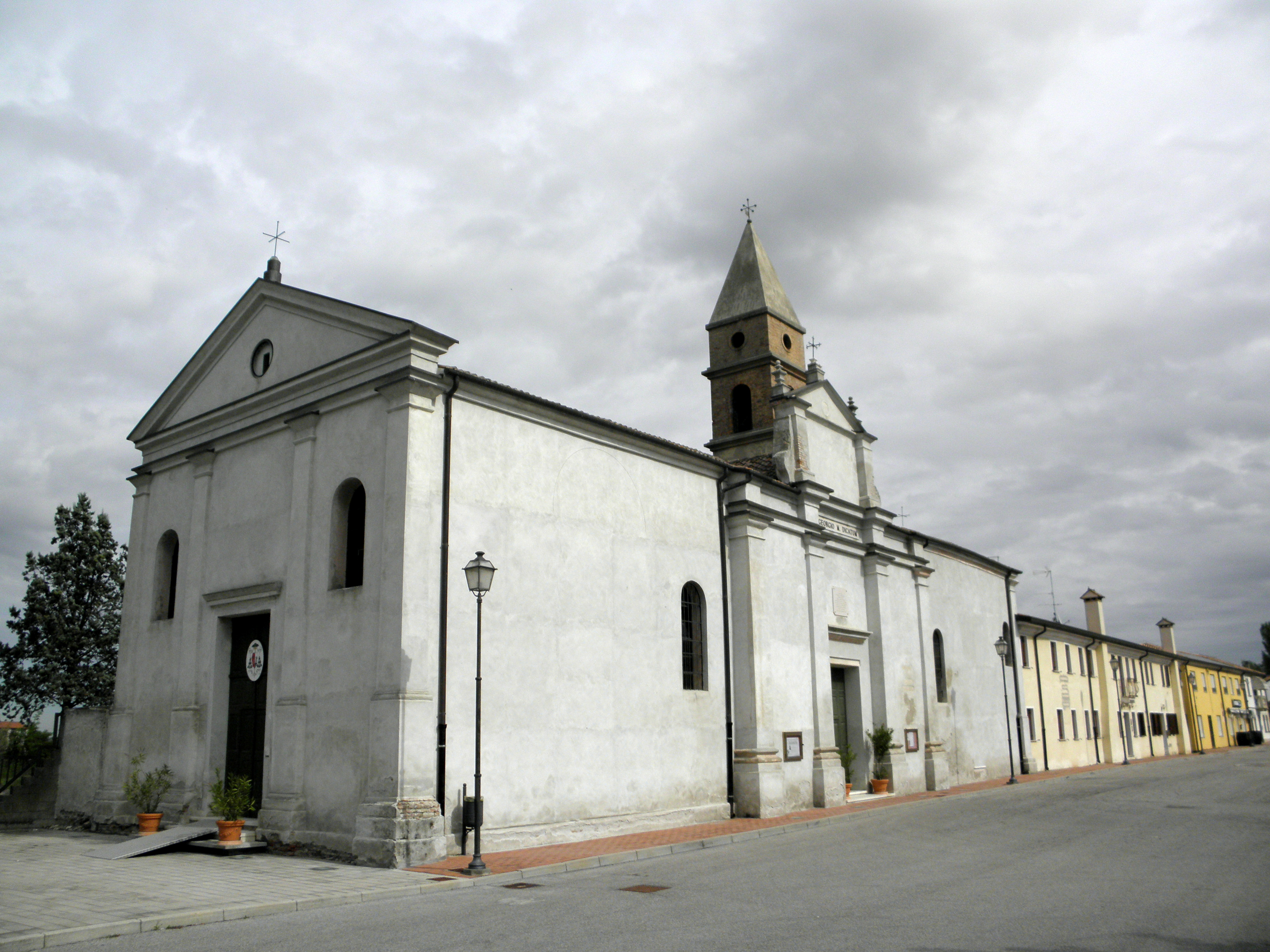 Mazzorno Sinistro, frazione di Adria: la chiesa di San Giorgio.